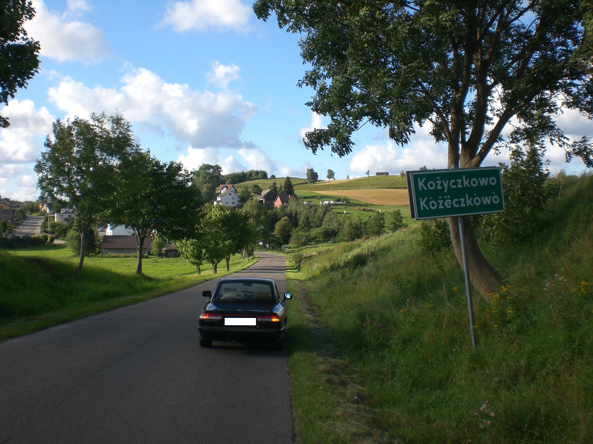 Kożyczkowo